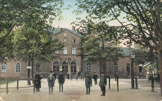 Postkarte des Bahnhof Zweibrücken, gelaufen 1917